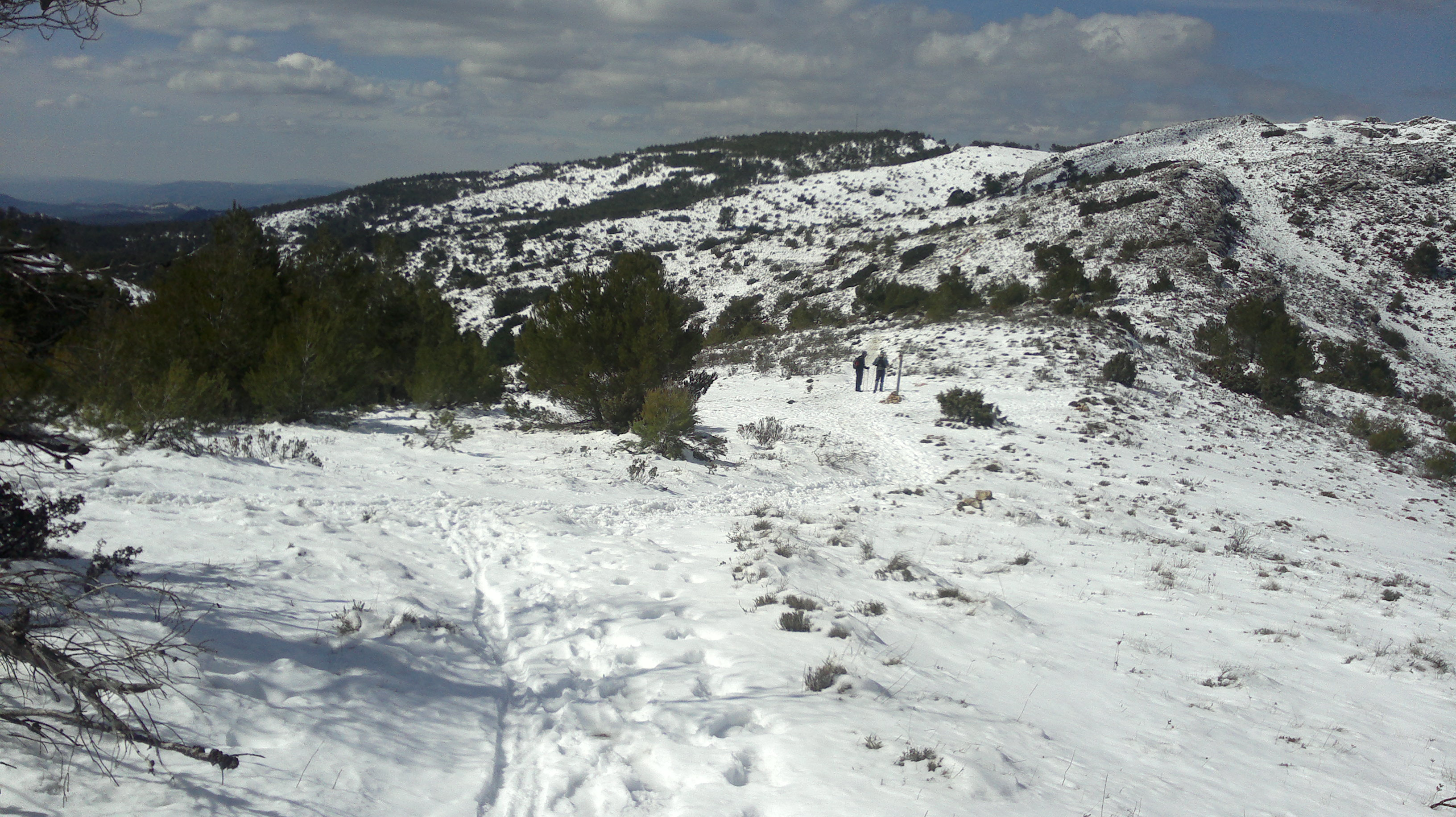 cami cap al refugi